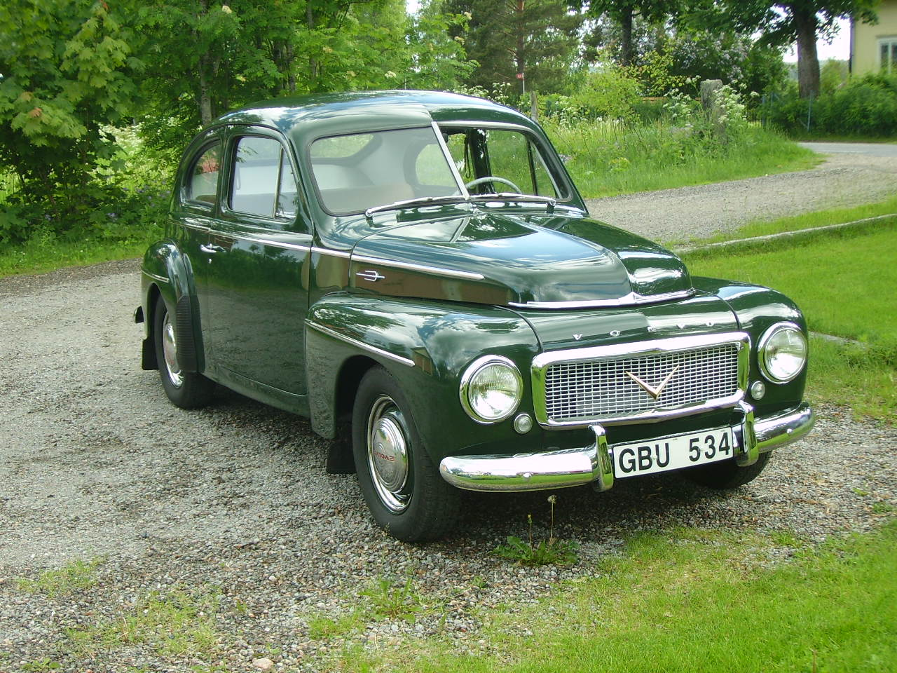 Volvo PV 444 LS -57 färg Smaragdgrön.